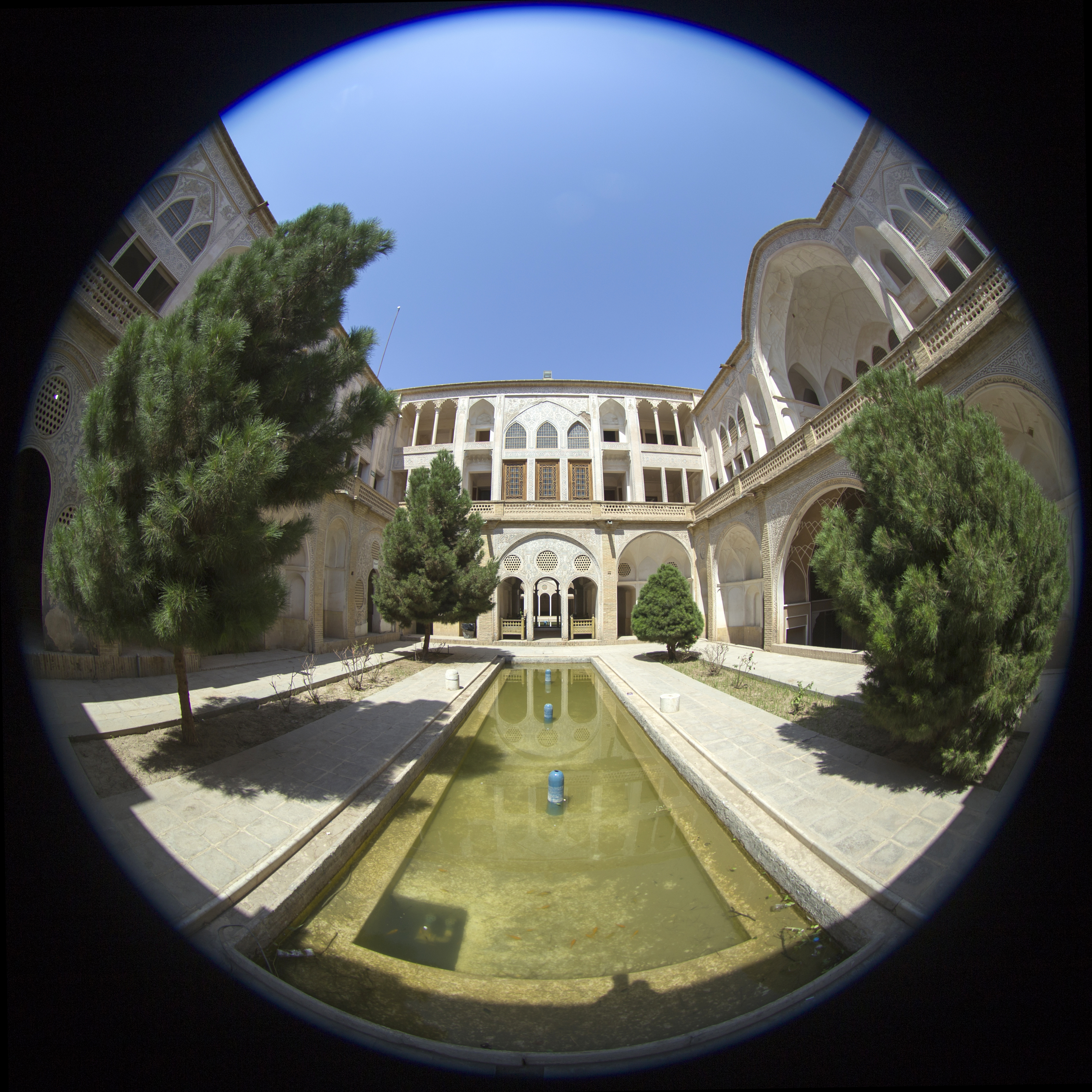 خانه عباسیان